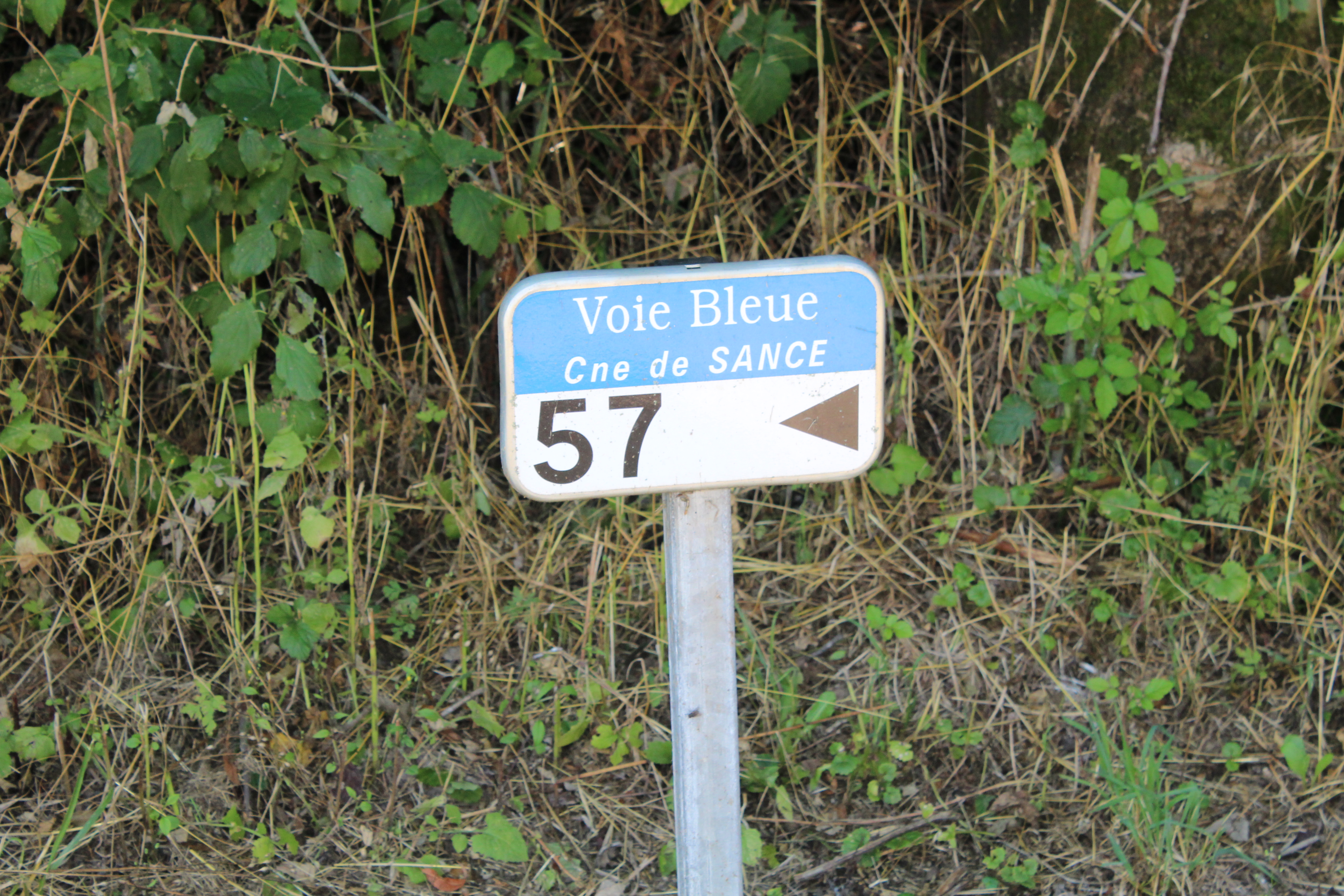 Panneau faisant office de borne kilométrique le long de la Voie Bleue à Sancé.